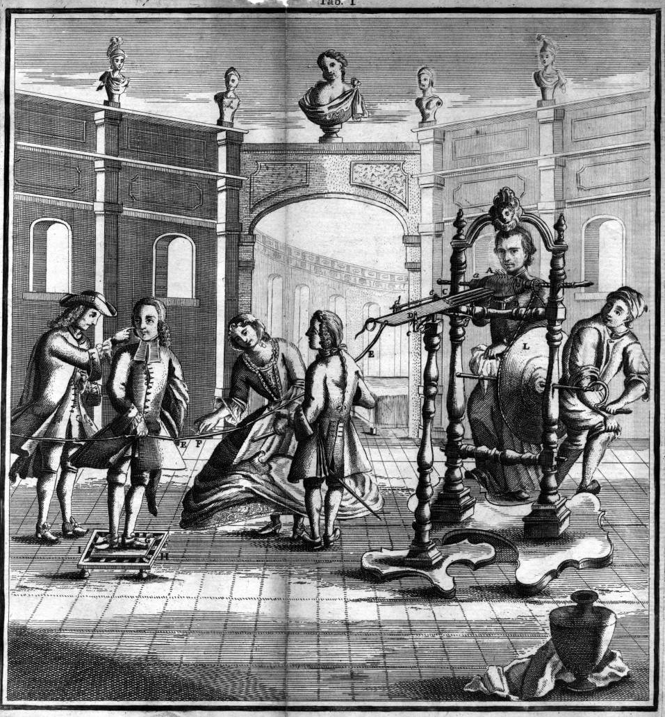 aus: Petrus Joannes Windler, Tentamina de causa electricitatis, Neapel 1747For an analysis of Windler’s plate as representing the experimenters of Palazzo Tarsia, including Della Torre and Ardinghelli see:Paola Bertucci: The Architecture of Knowledge: Science, Collecting, and Display in eighteenth-century Naples, in; New Approaches to Naples c.1500-c.1800: The Power of Place, ed. Melissa Calaresu and Helen Hills. Aldershot: Ashgate, 2013